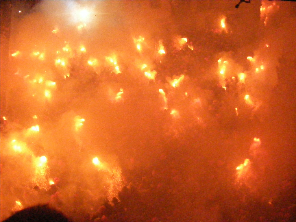 1r Salt de Plens